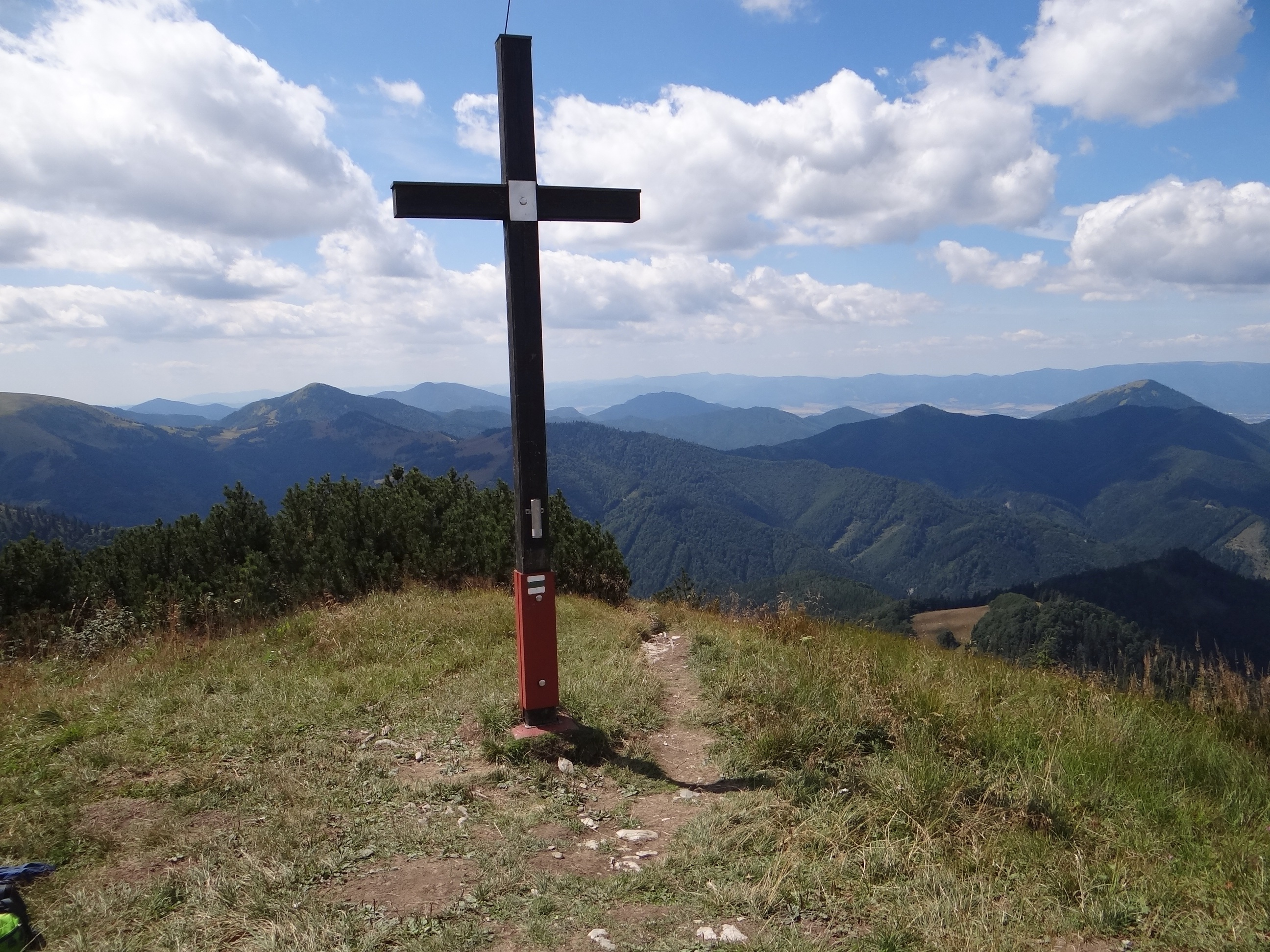 Rakytov